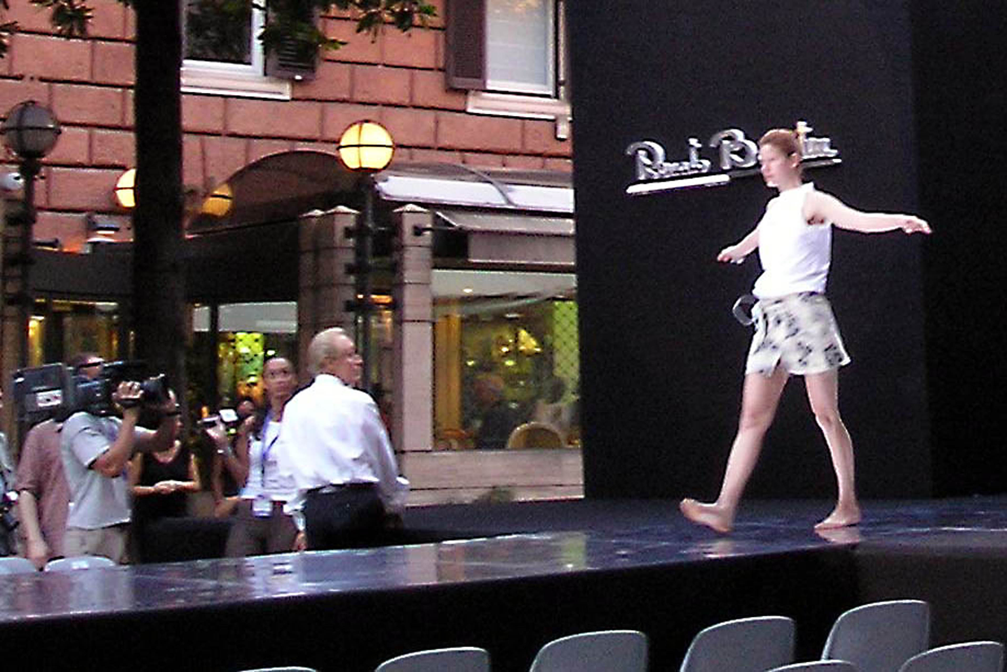 Préparatifs du défilé de Renato Balestra, via Veneto à Rome Model on the catwalk, via Veneto, in Rome, during summer 2004.